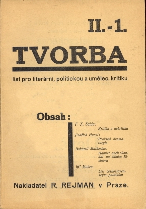 Tvorba, 1/1927